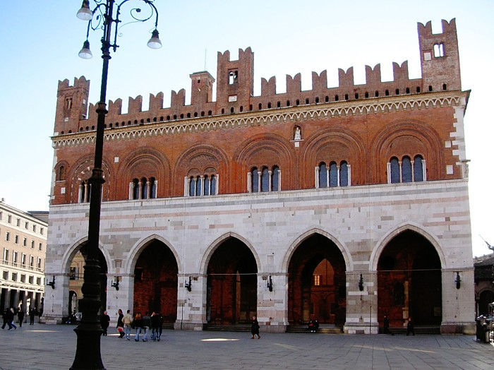 Il medievale Palazzo del Comune a Piacenza (iniziato nel 1281), detto comunemente "il Gotico", nella "Piazza dei cavalli" di Piacenza. Picture taken by user:Idéfix, febrary 2005.